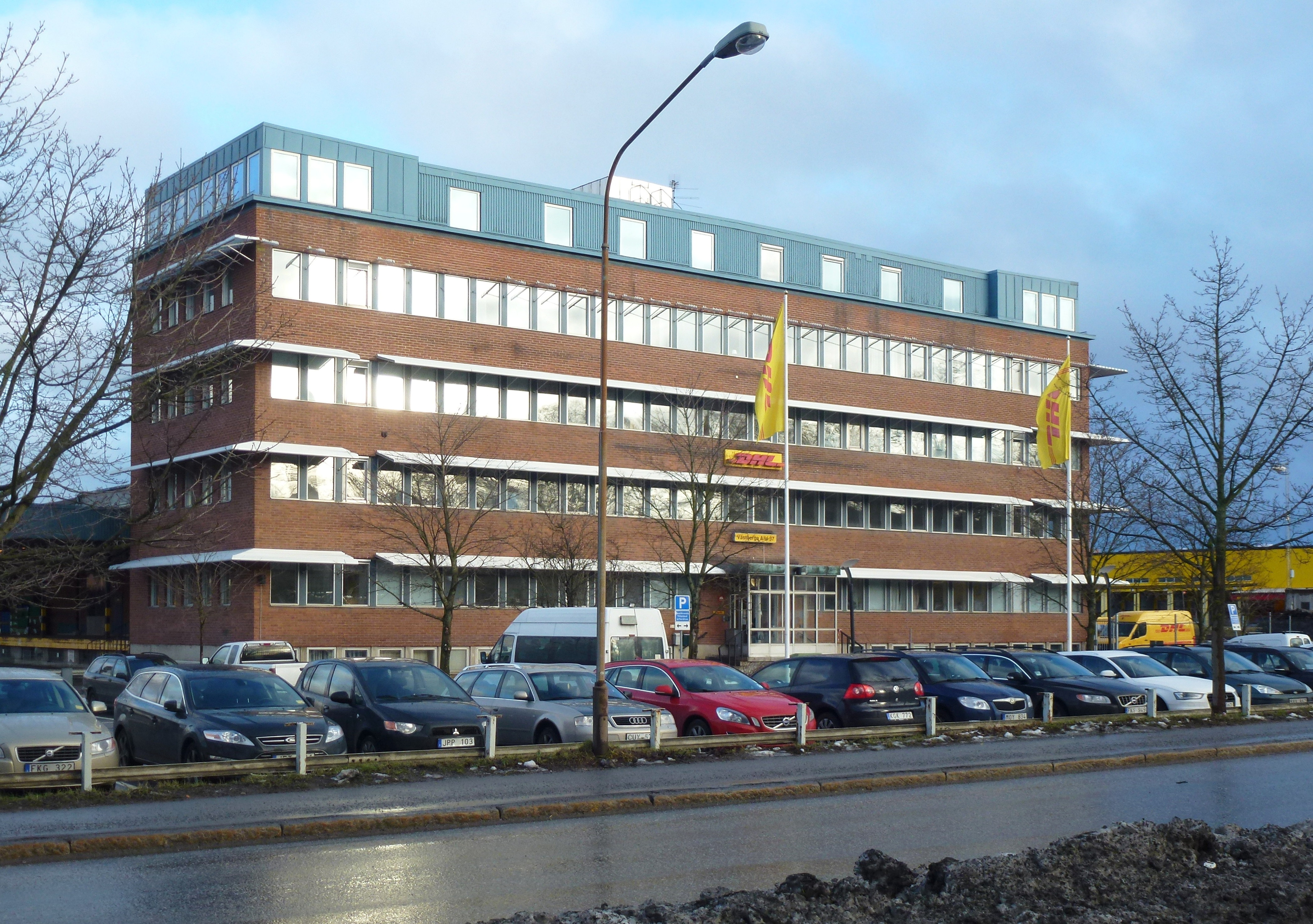 Västberga allé 37, DHL Nordic AB, byggd 1968 - 1972